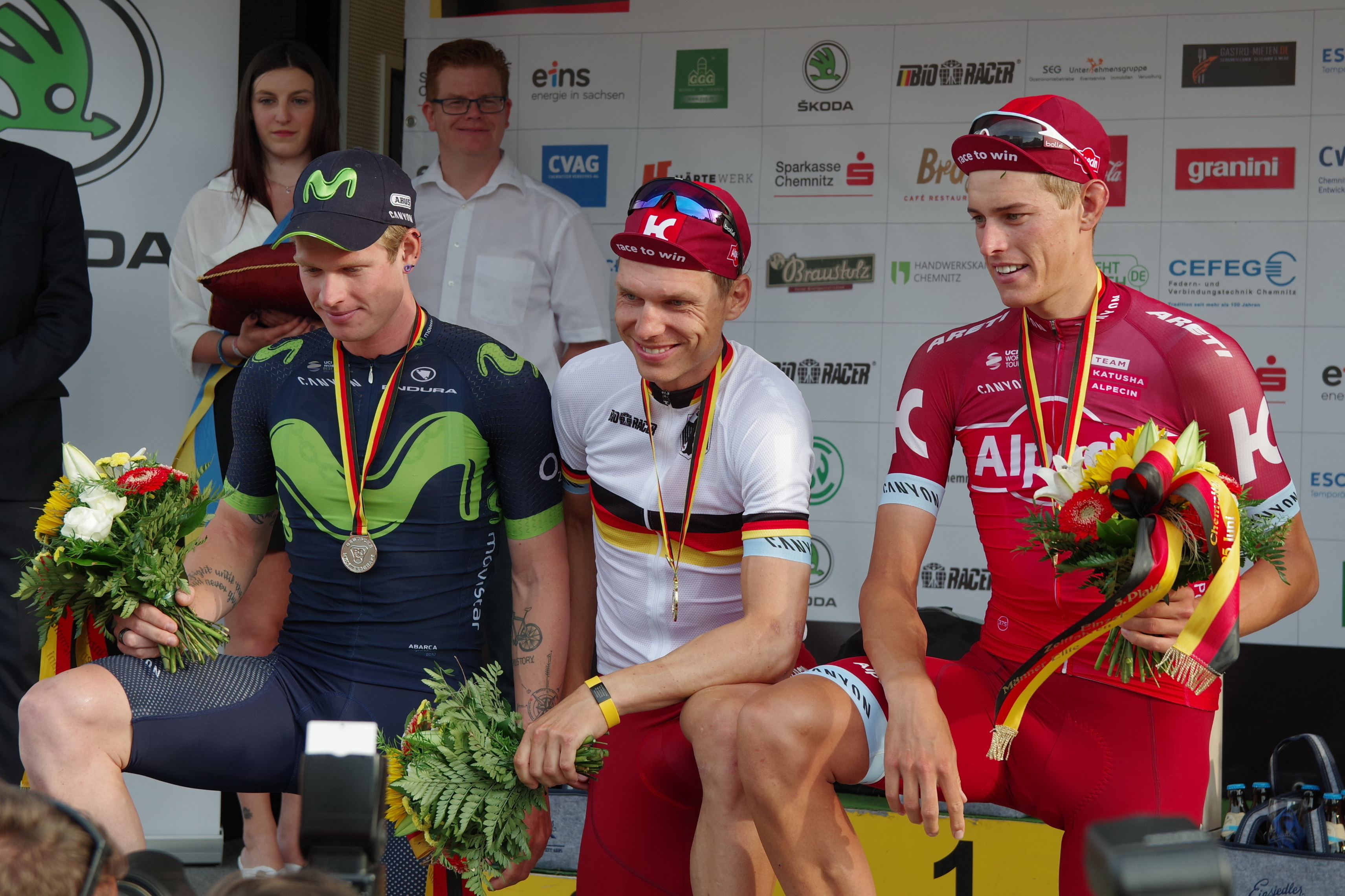 Deutsche Meisterschaften im Einzelzeitfahren 2017 23. Juni 2017 Siegerehrung Herren Platz 1: Tony Martin Platz 2: Jasha Sütterlin Platz 3: Nils Politt The making of this document was supported by the Community-Budget of Wikimedia Germany.